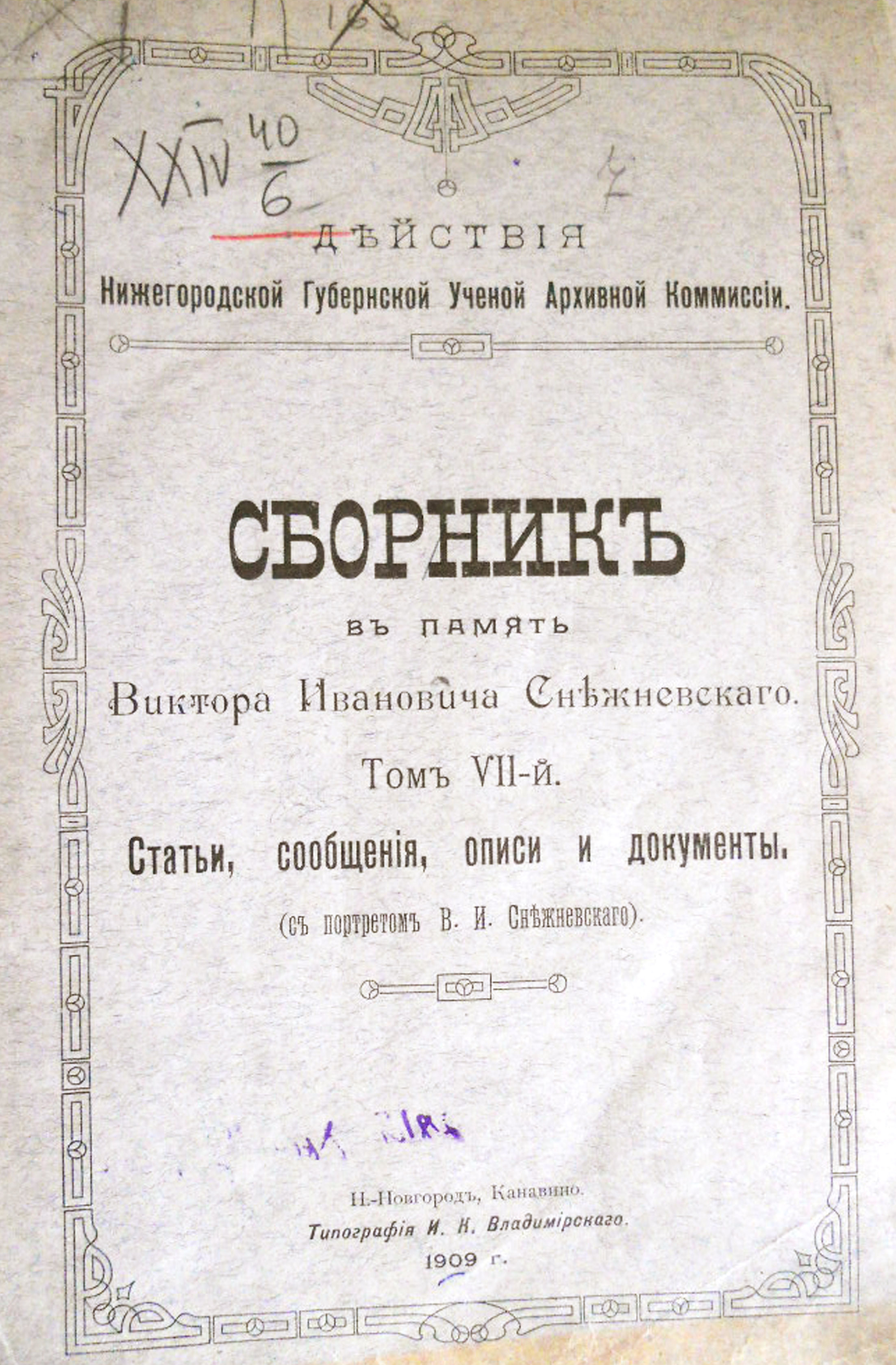 Титульный лист Сборника НГУАК в память В.И. Снежневского